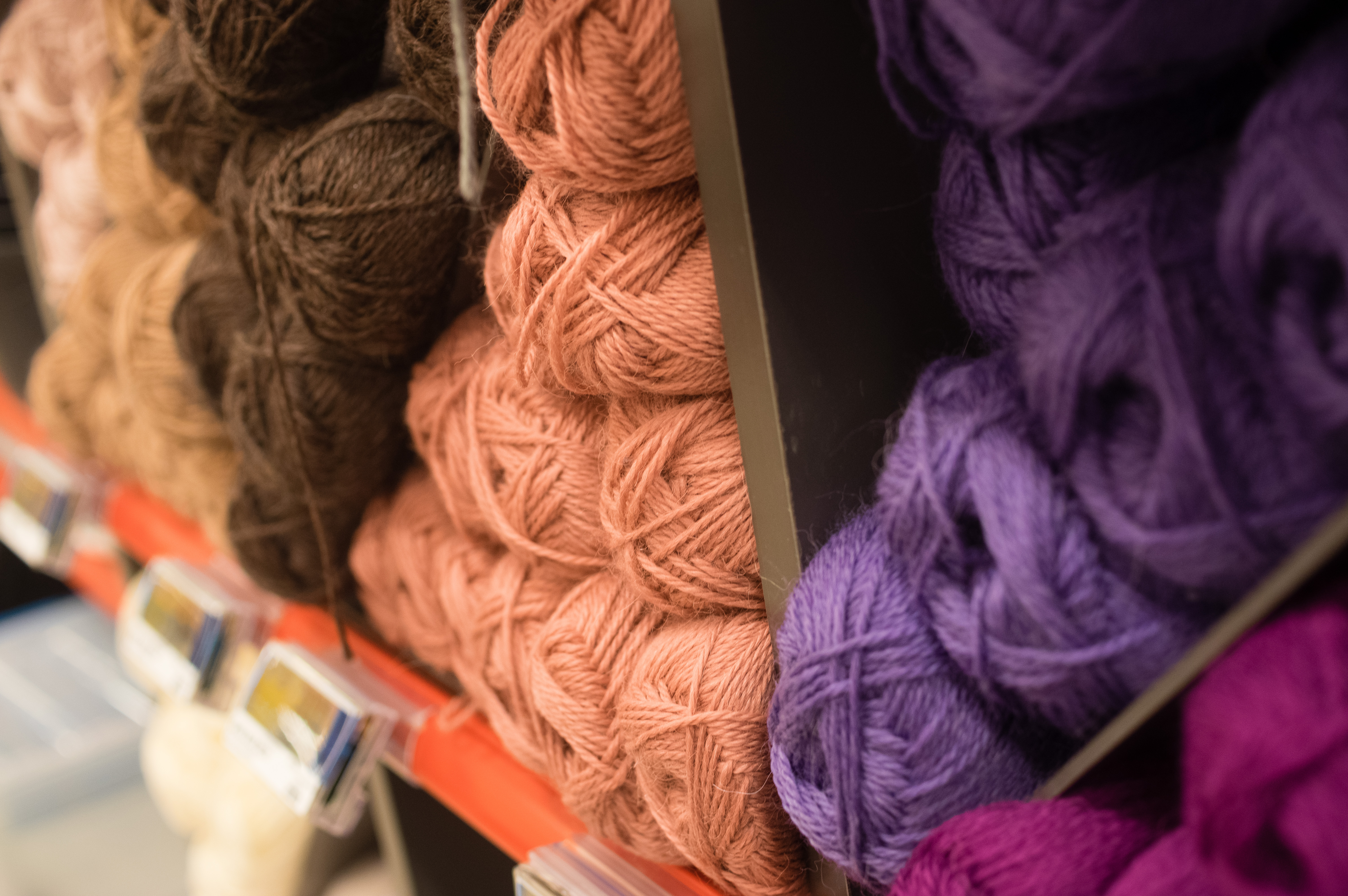 Garnnøster i en butikk.